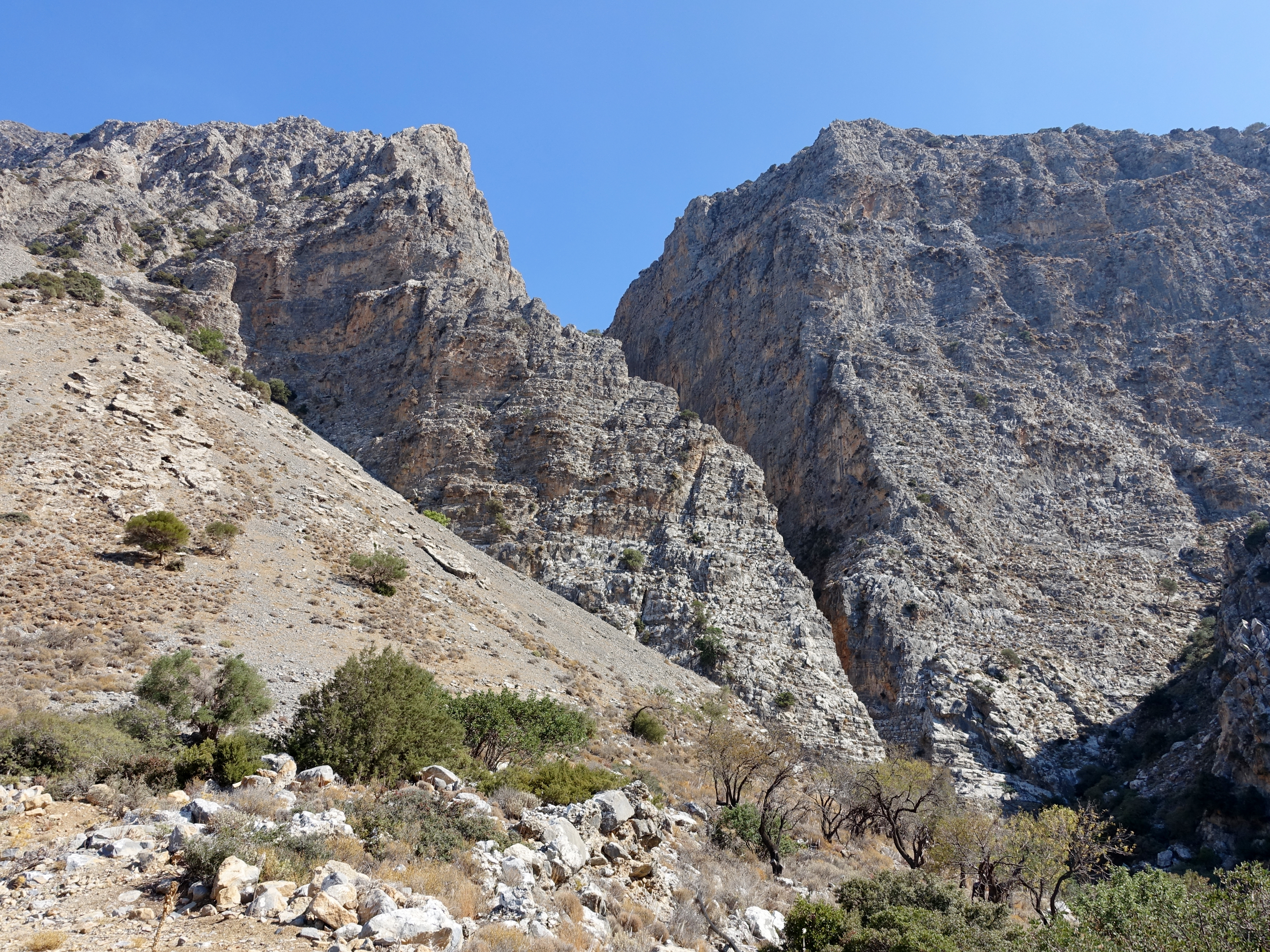 Eingang zur Cha-Schlucht bei Monastiraki, Kreta, Griechenland